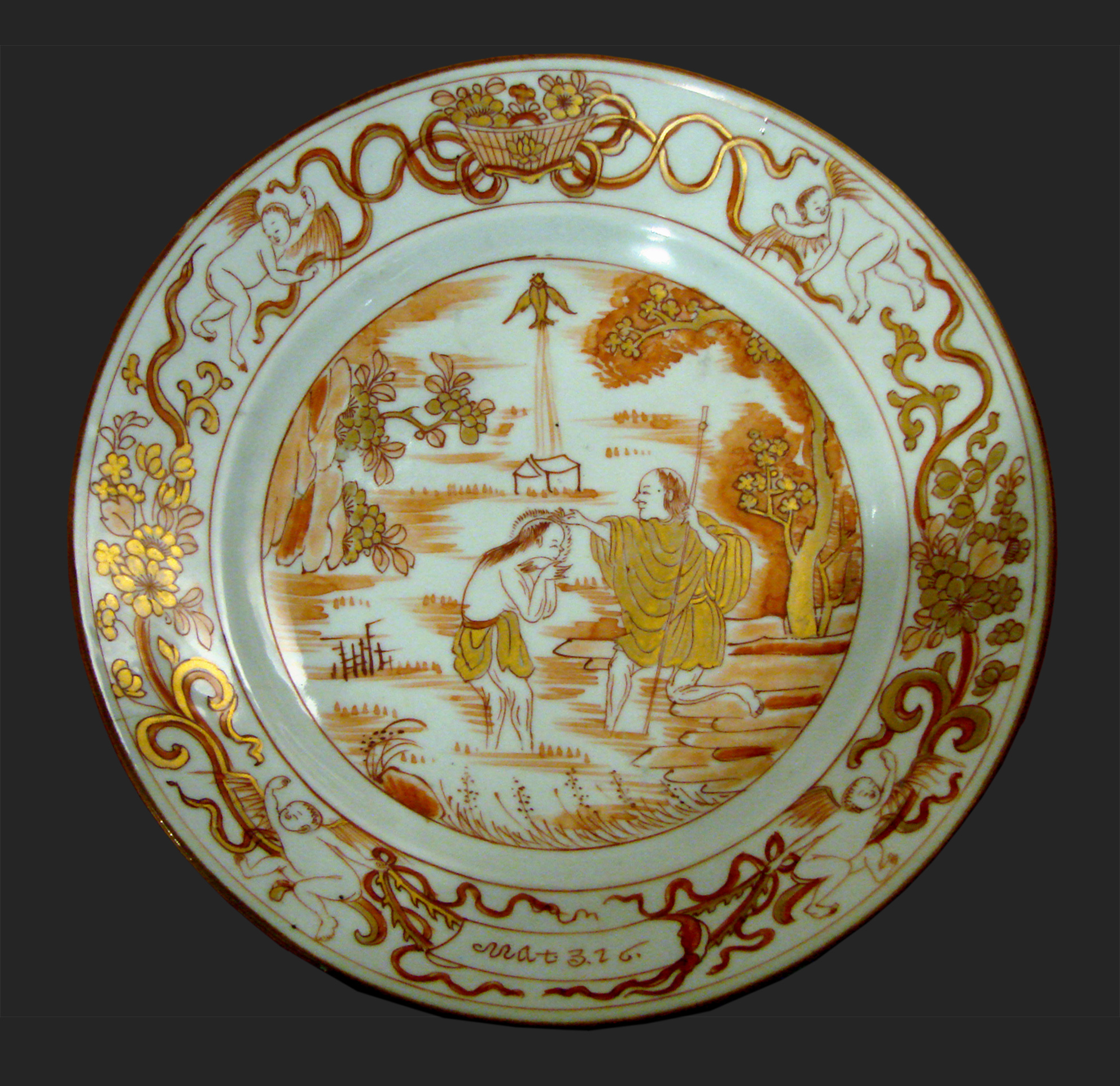 Plat représentant le baptême du Christ, d'après une gravure européenne. Porcelaine avec rouge de fer et rehauts d'or. Pièce destinée à l'exportation. Dynastie Qing, vers 1725-1735. Musée Guimet, Paris.